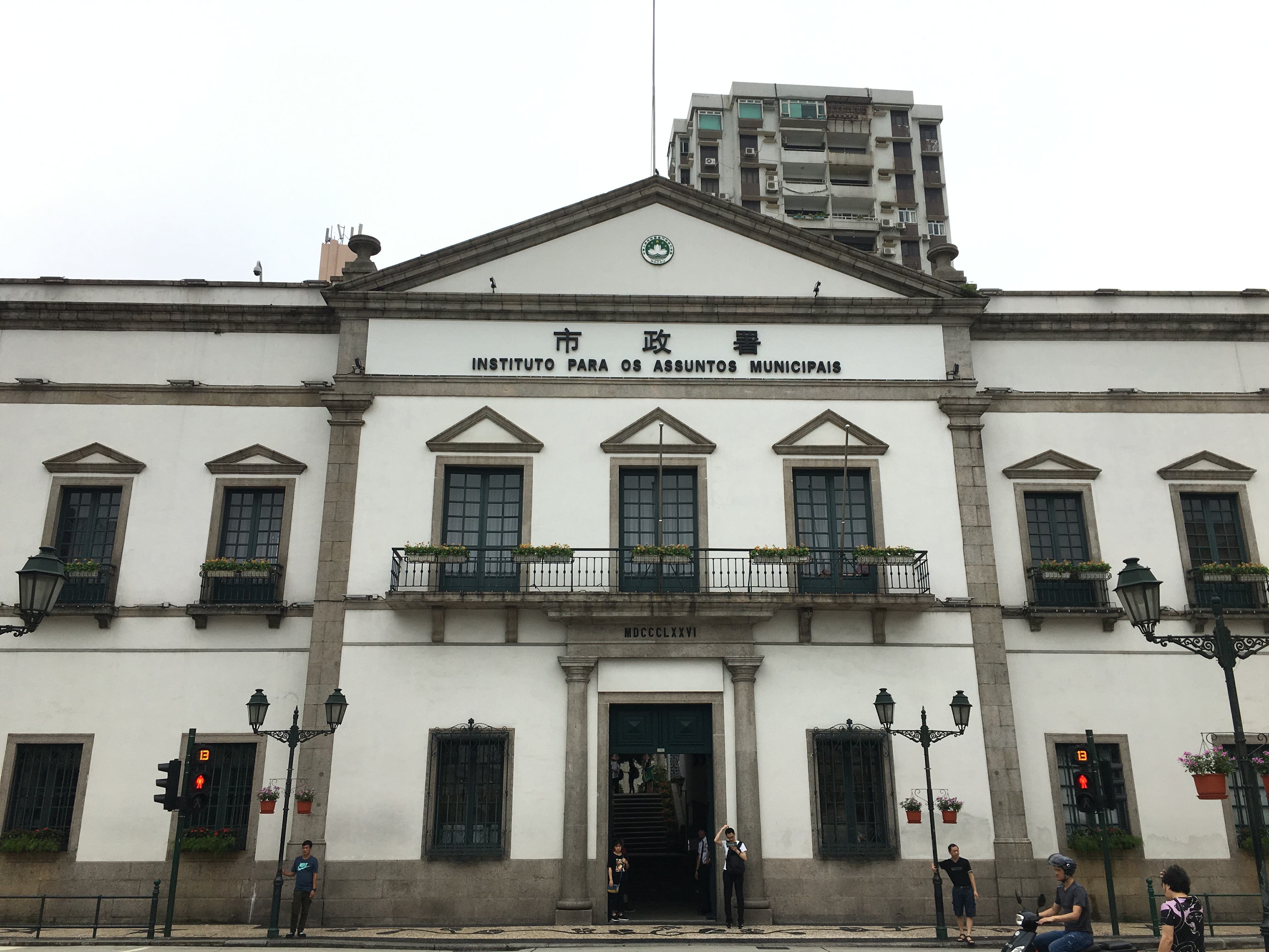 澳門市政府總部